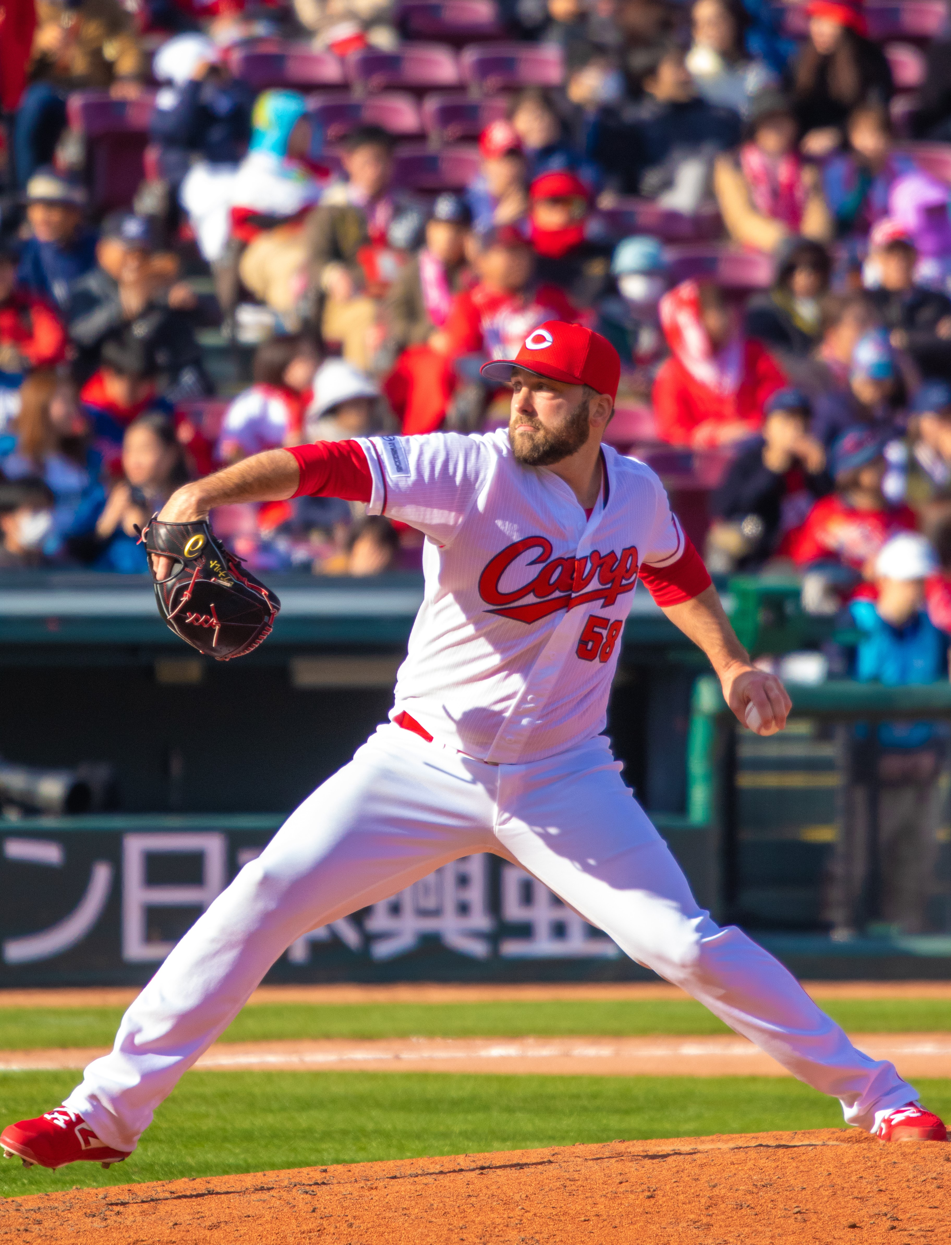 2019/3/13 マツダスタジアム